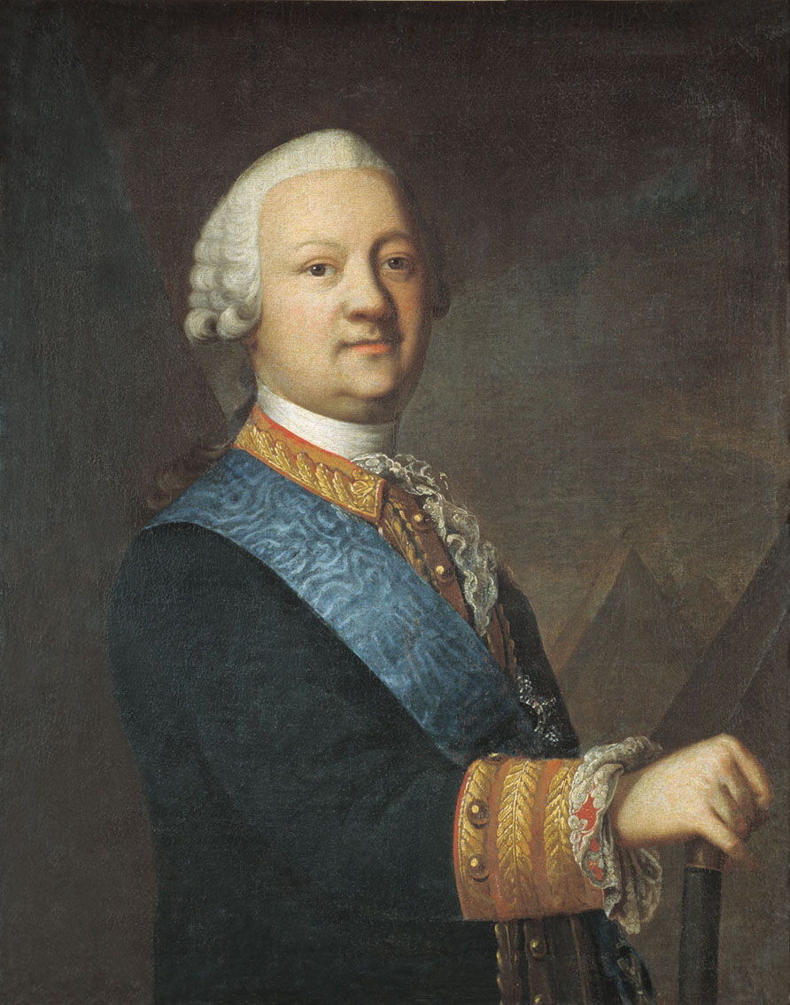 ГРИГОРИЙ СЕРДЮКОВ Портрет графа П.И. Панина. Не позднее 1767